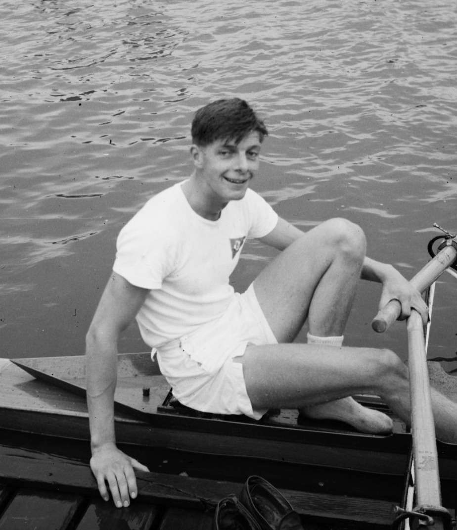 Heren Lustrum roeien Bosbaan. Skiffen Van Mesdag